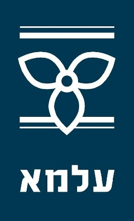 סמליל (לוגו) עלמא בית לתרבות עברית